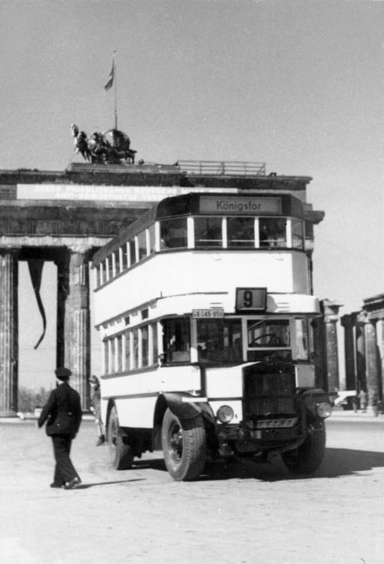 Berlin, Doppeldecker-Bus am Brandenburger Tor Ab 1.5.49 verkehrt zwischen Königstor und Brandenburger Tor die Omnibuslinie 9. Aufn.-Tag 2.5.49 (ABOAG Omnibus gebaut 1927 ! = sehr gut abgebildet als Sechsrad- Doppeldecker-Omnibus der Linie 9 im Buch: H. Büssing: Mensch, Werk, Erbe, Seite 285. Vandenhoeck & Ruprecht-Verlag 1989 ISBN 3-525-13175-5